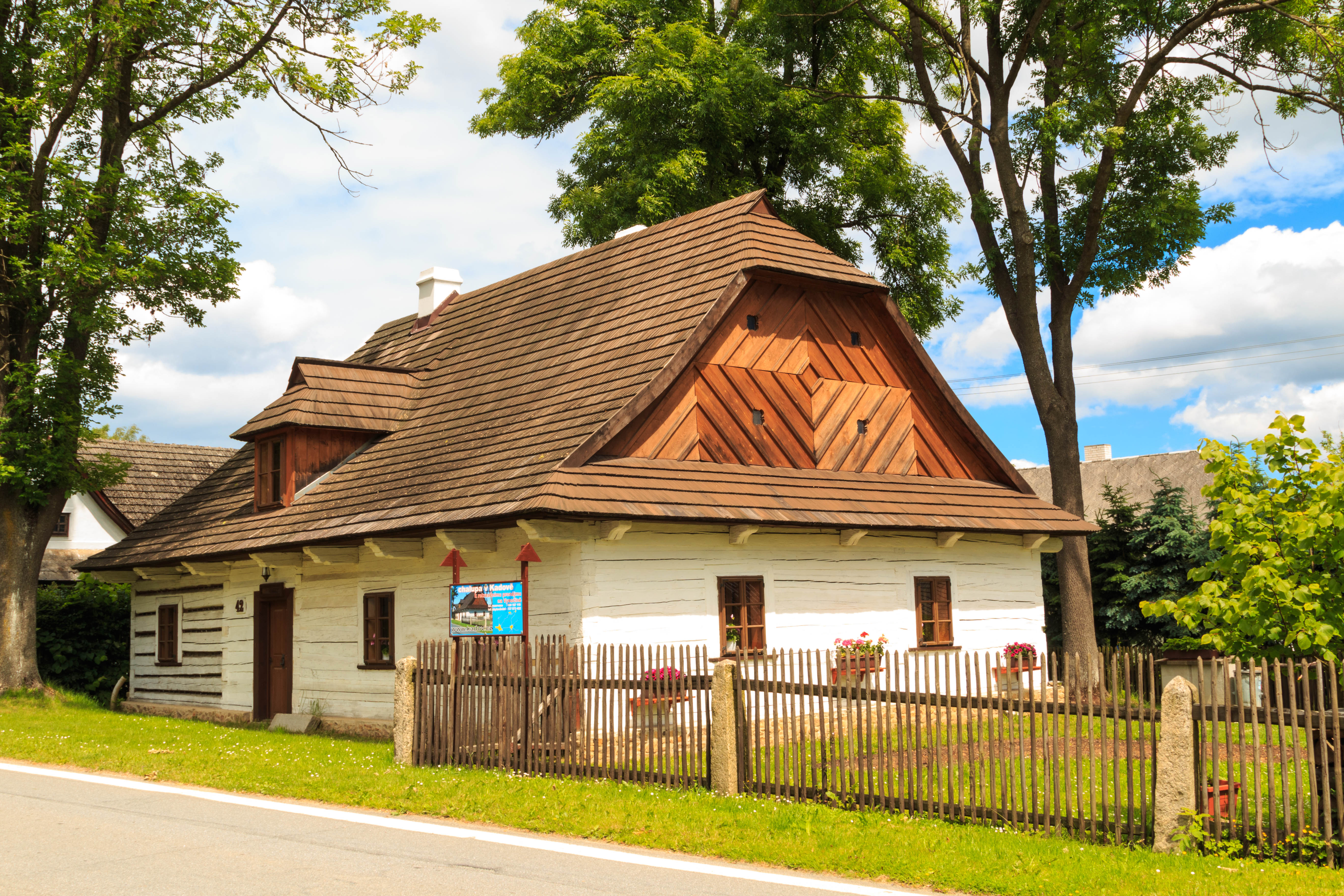 Kadov čp. 42